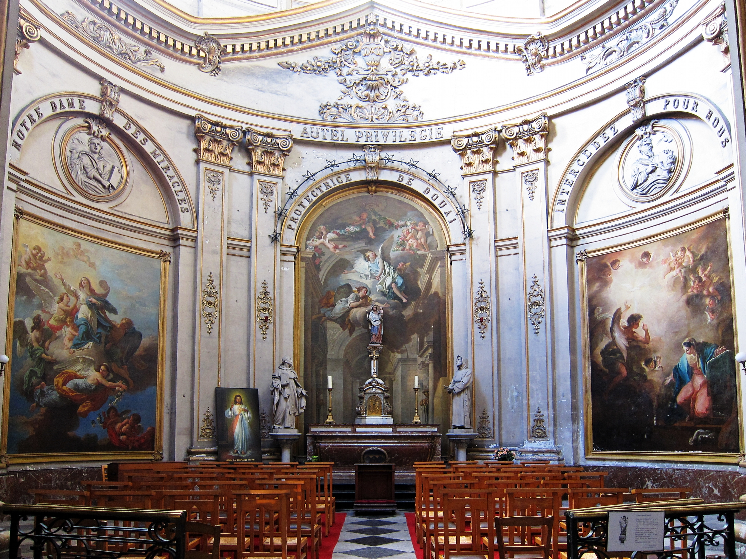 La chapelle de Notre-Dame des miracles dans la collégiale Saint Pierre de Douai (Nord). .